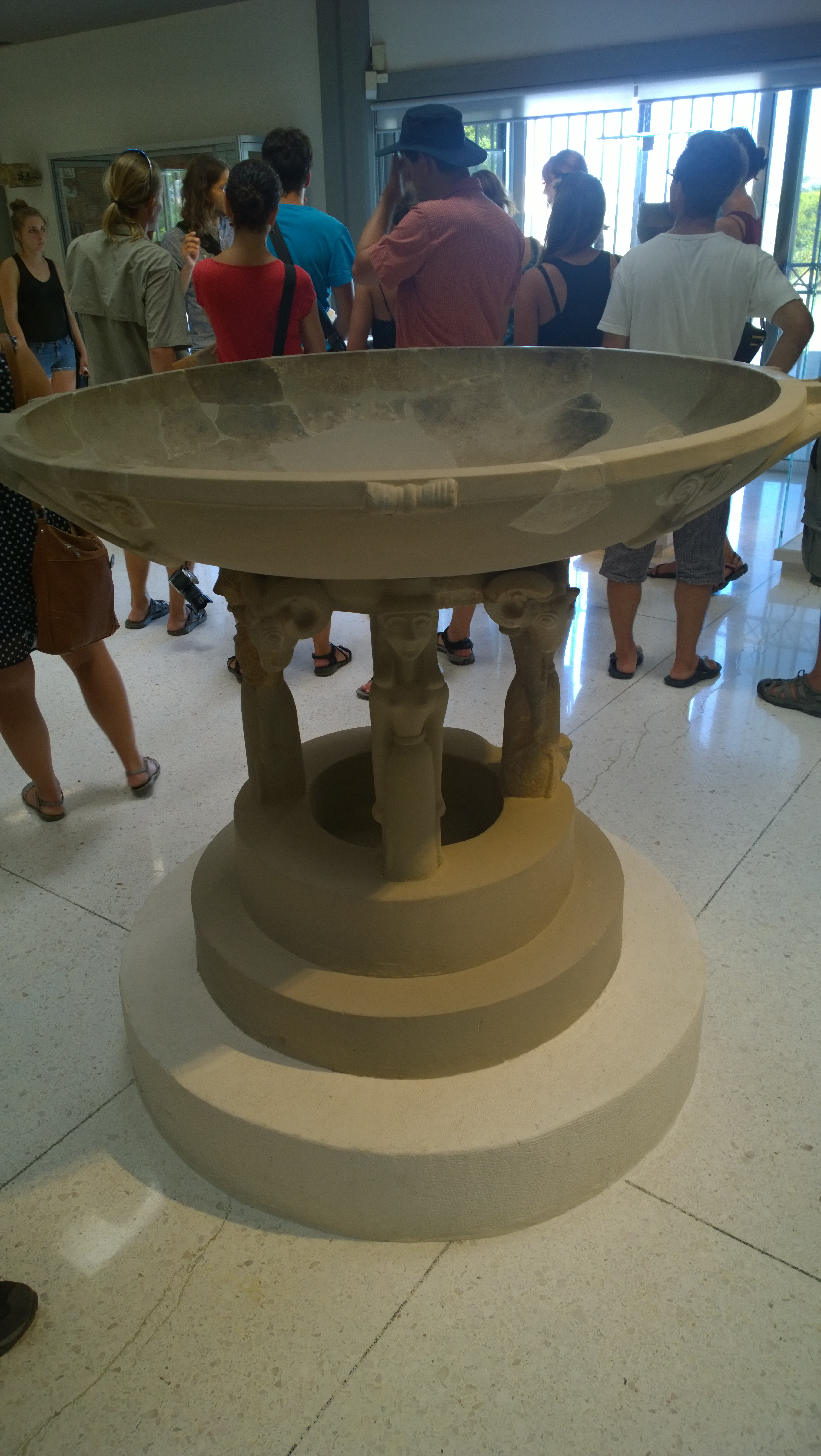 Archaický Perirrhanterion z Poseidónovi svatyně, 7 st. př. n. l.